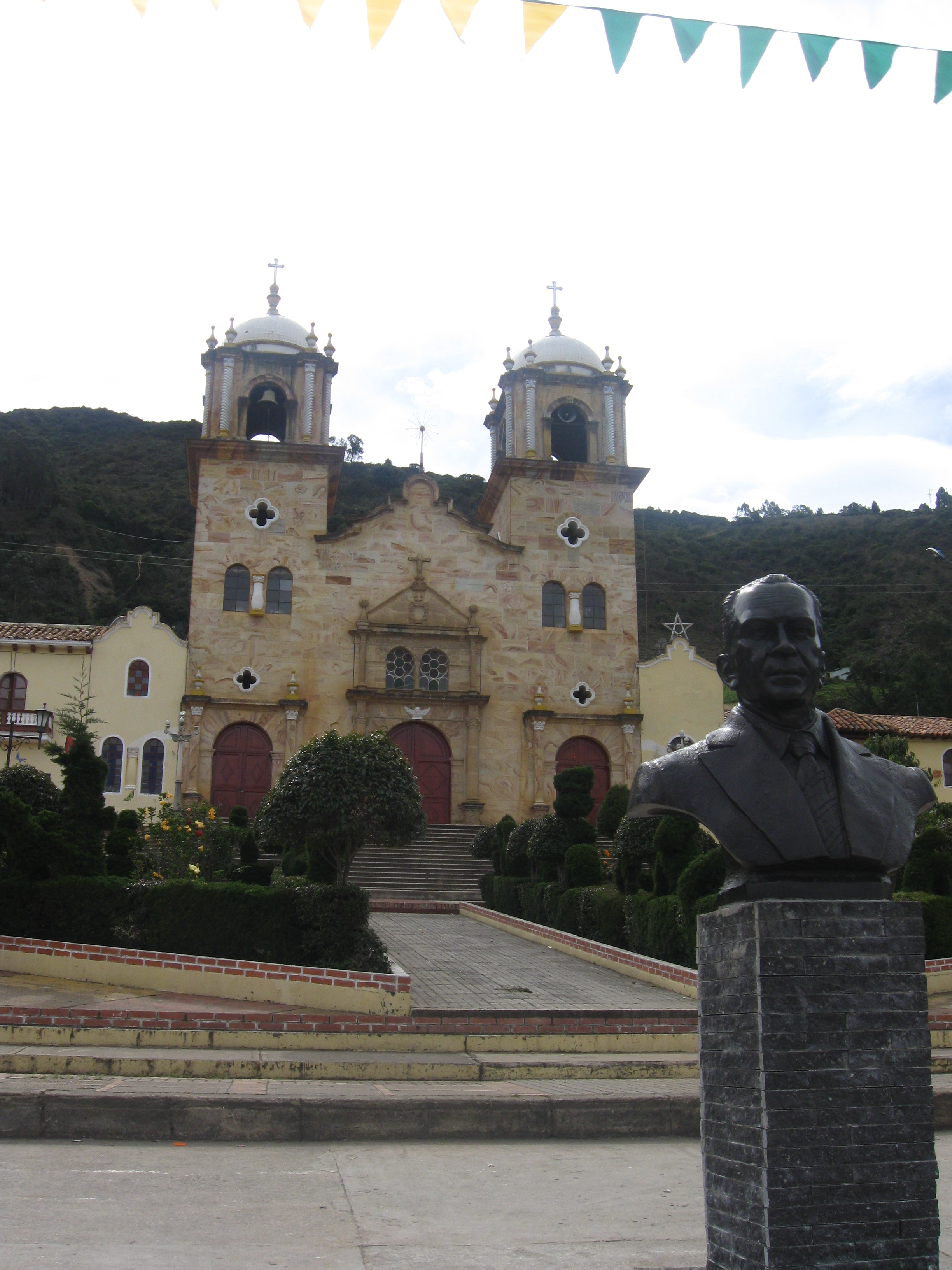 Calle de Sativanorte, Boyaca, Colombia. Muestra de la arquitectura de este pueblo.